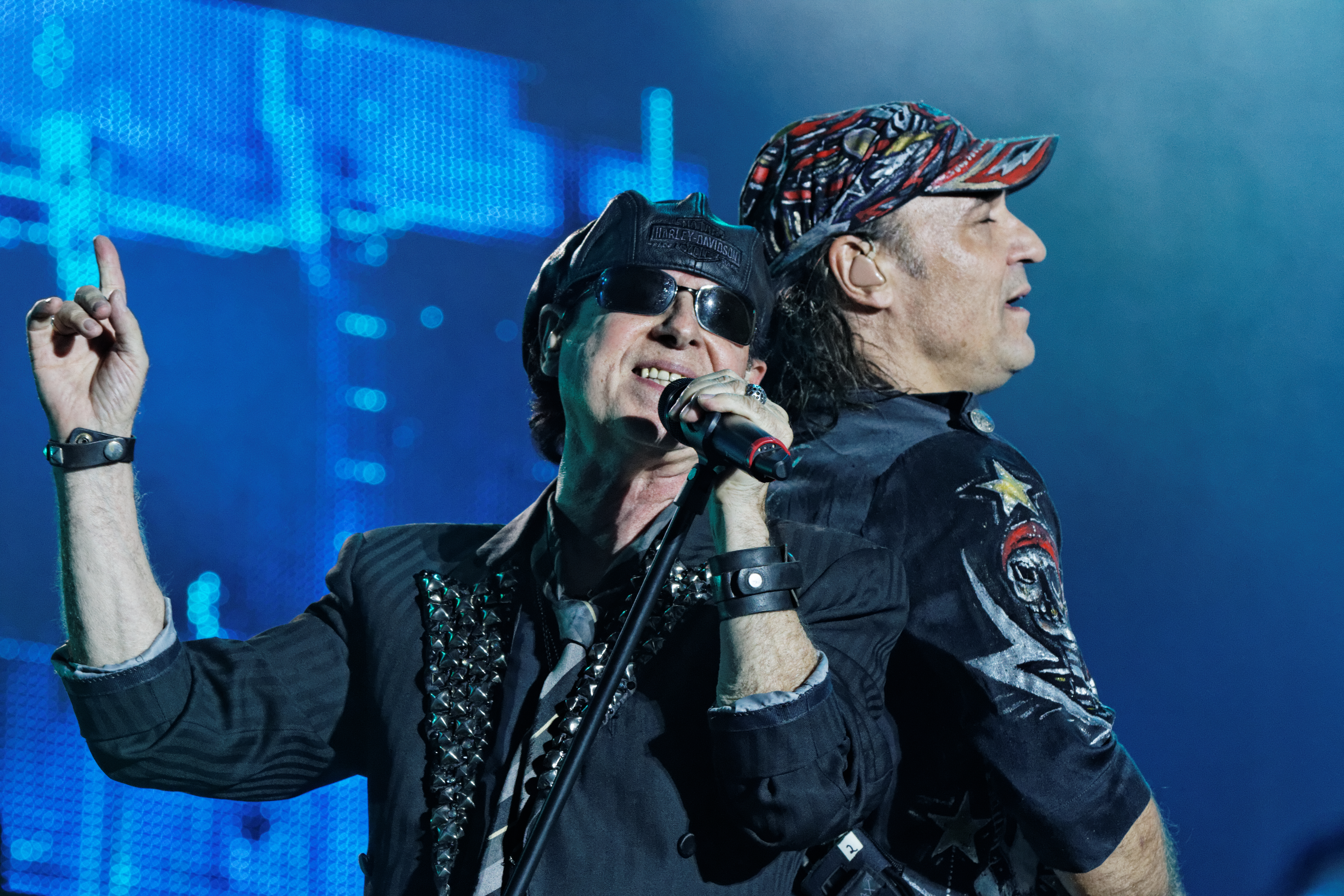 Scorpions en concert sur la grande scène lors de la fête de l'Humanité 2014.